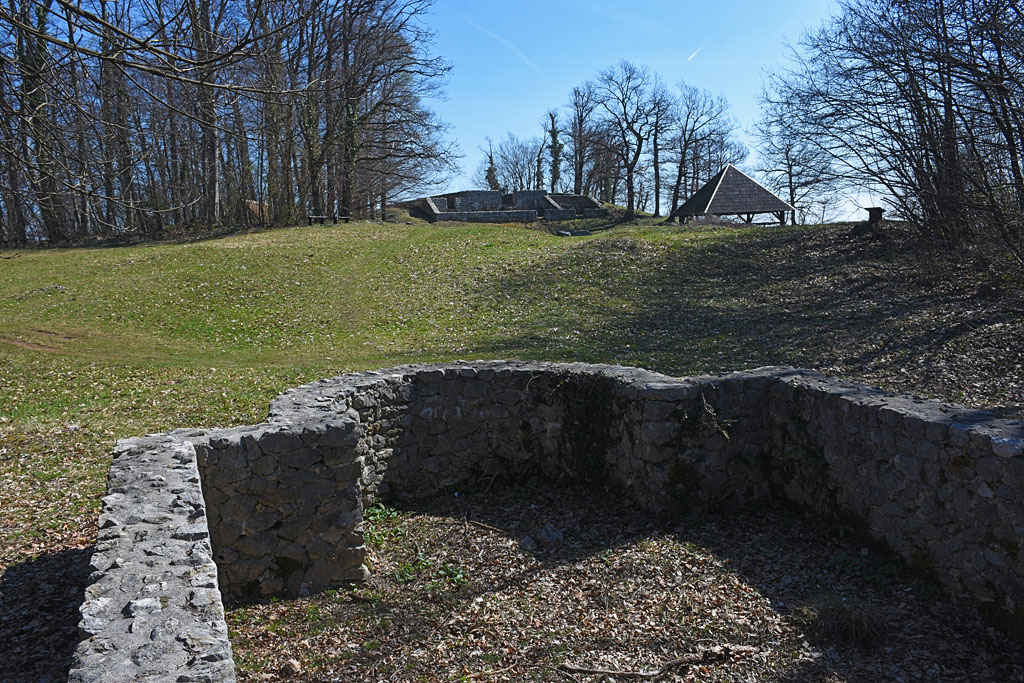 Ostanki arijanske cerkve na Rifniku